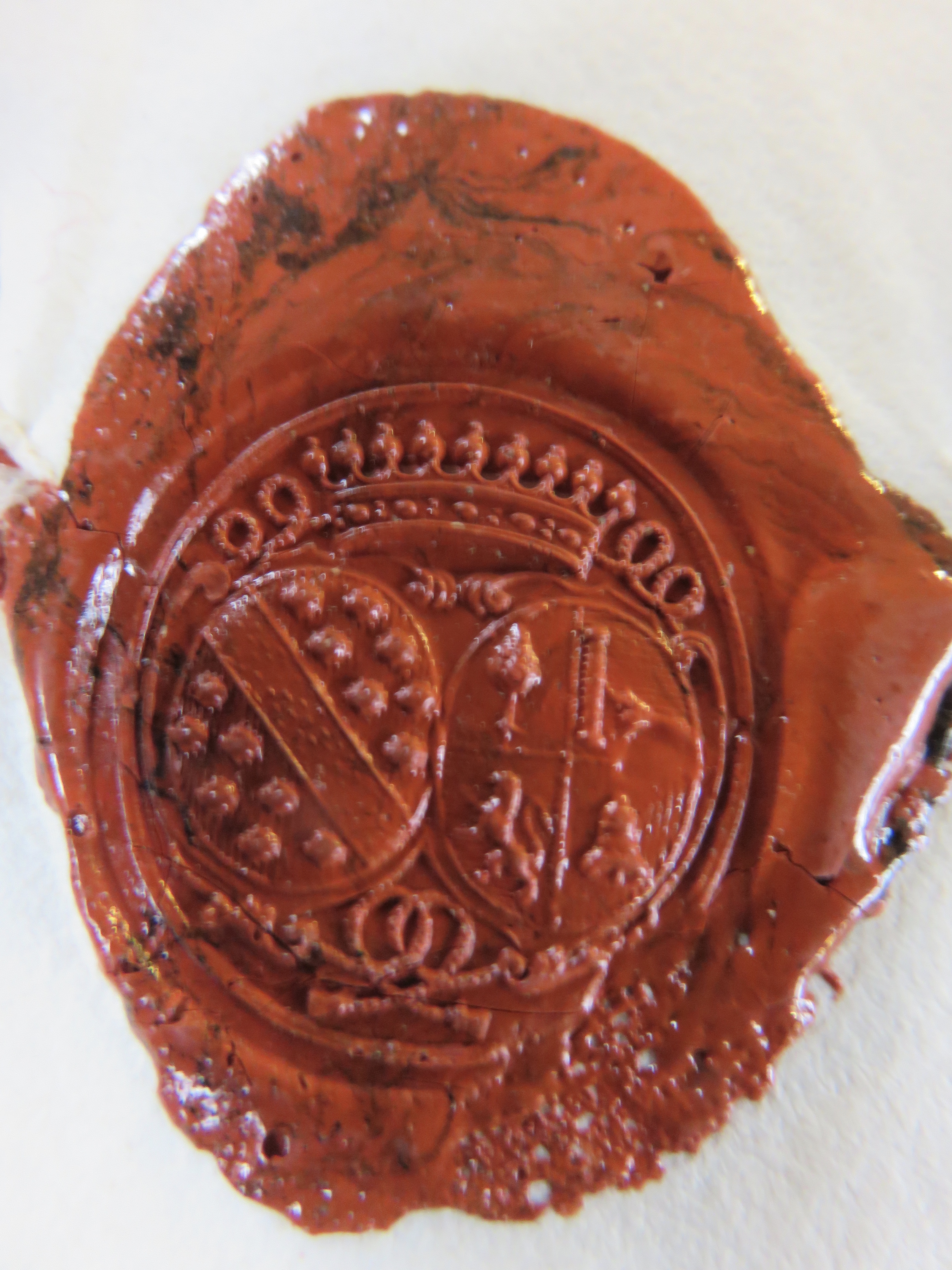 Sceau de Marie-Anne Fargès de Polizy, avec à droite ses armes et à gauche celles de son mari, Abraham Peyrenc de Moras